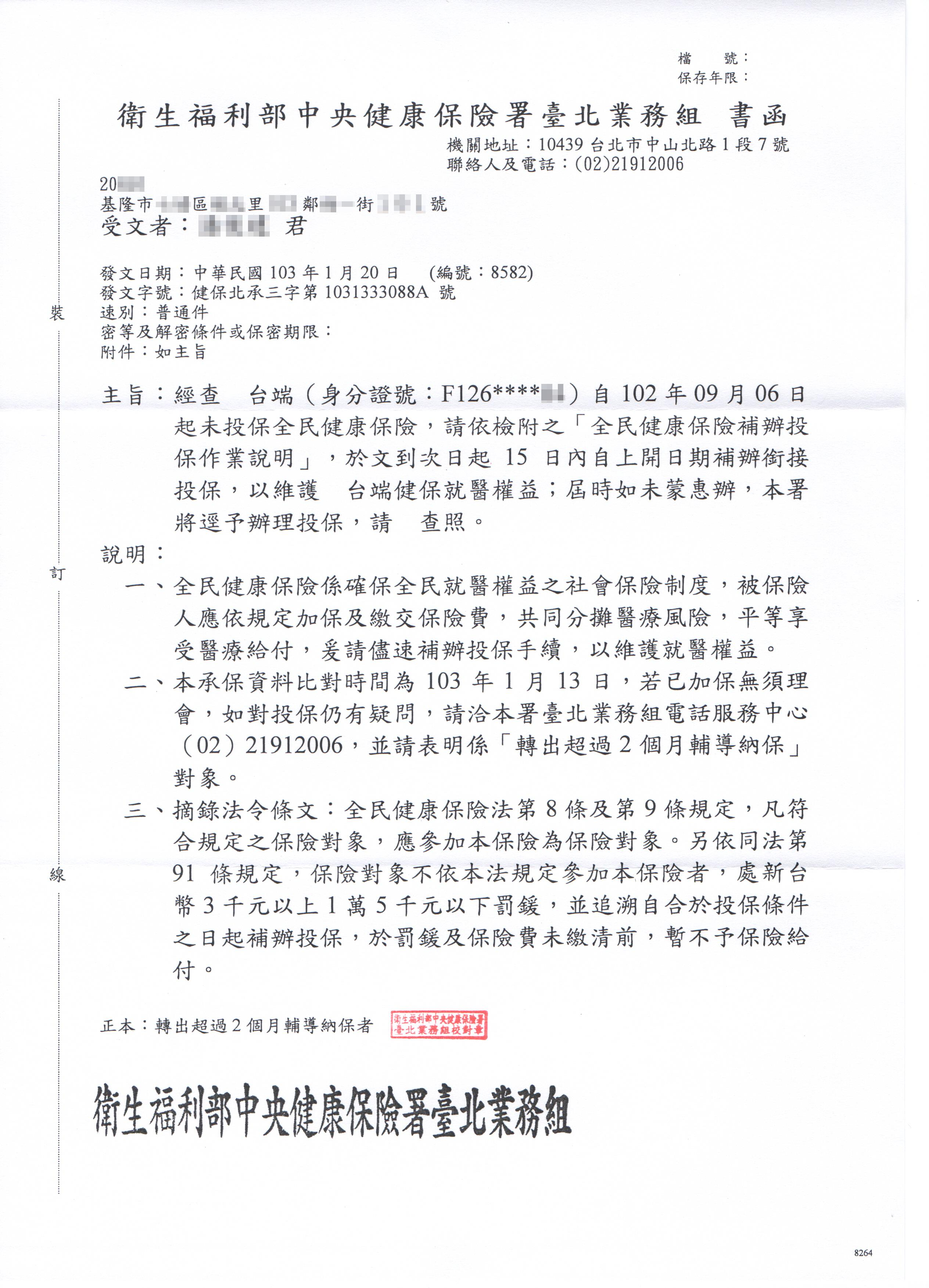 中華民國衛生福利部中央健康保險署臺北業務組書函，通知不參加全民健康保險者將被處罰款。